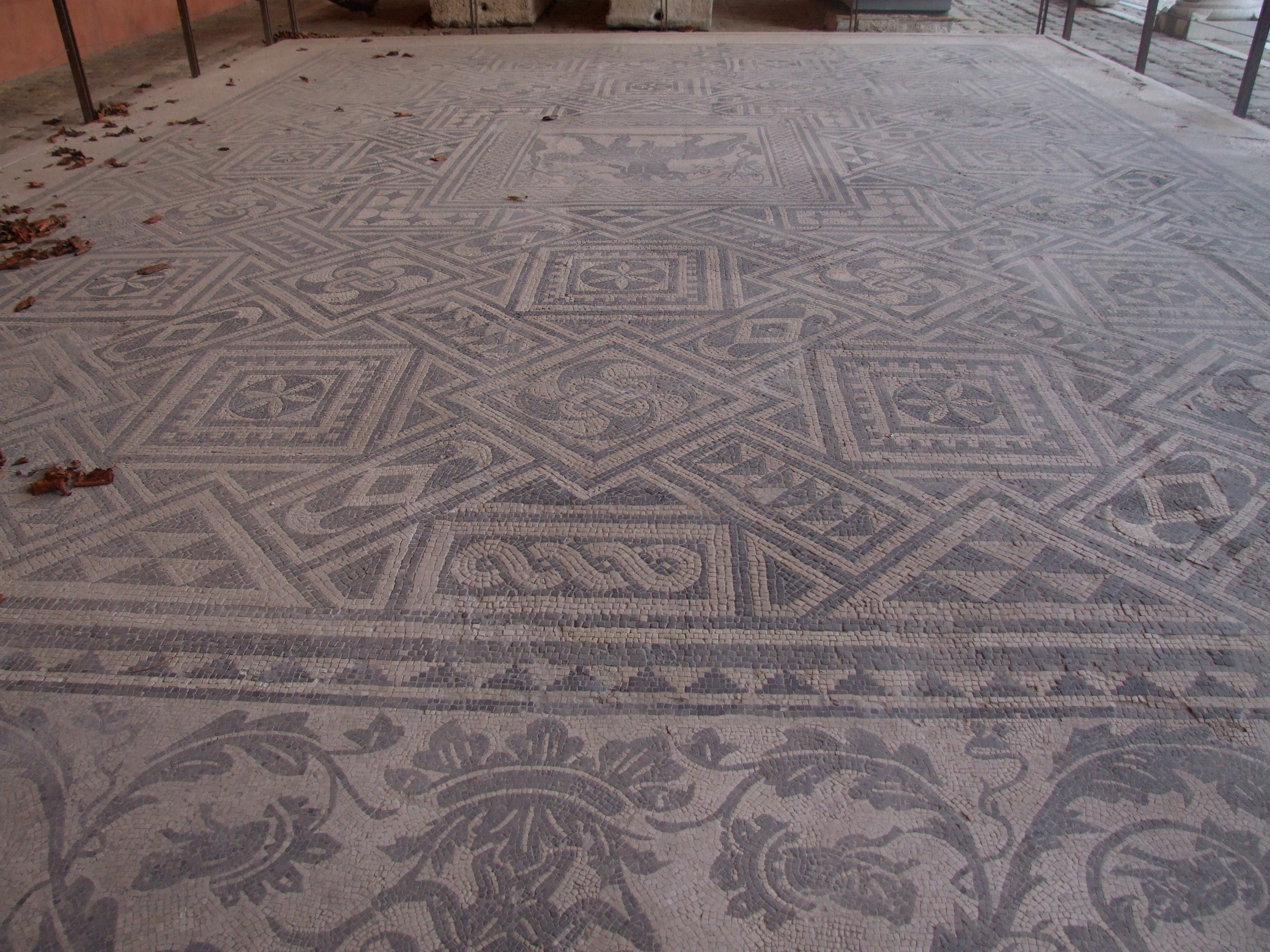 Palazzo Malatestiano This is a photo of a monument which is part of cultural heritage of Italy.